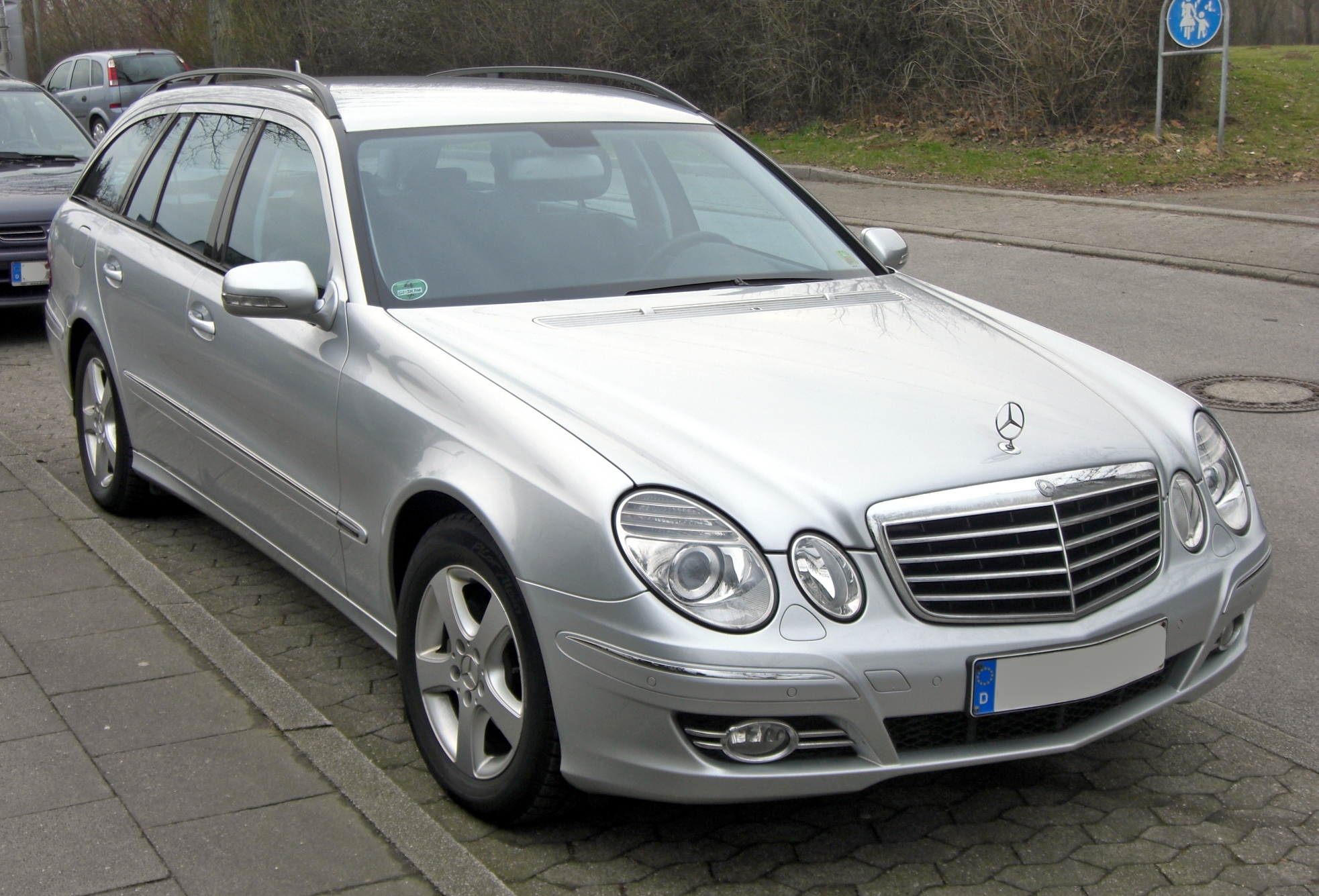 Mercedes E-Klasse T-Modell